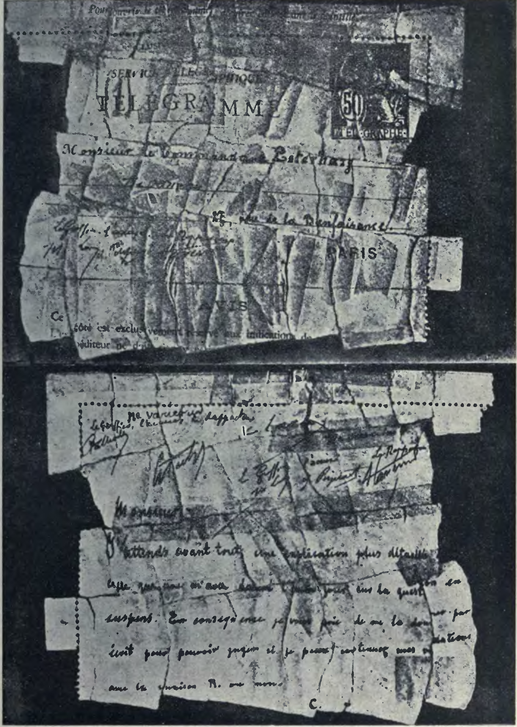 Illustration, Histoire de l'Affaire Dreyfus, volume 1, le petit bleu.